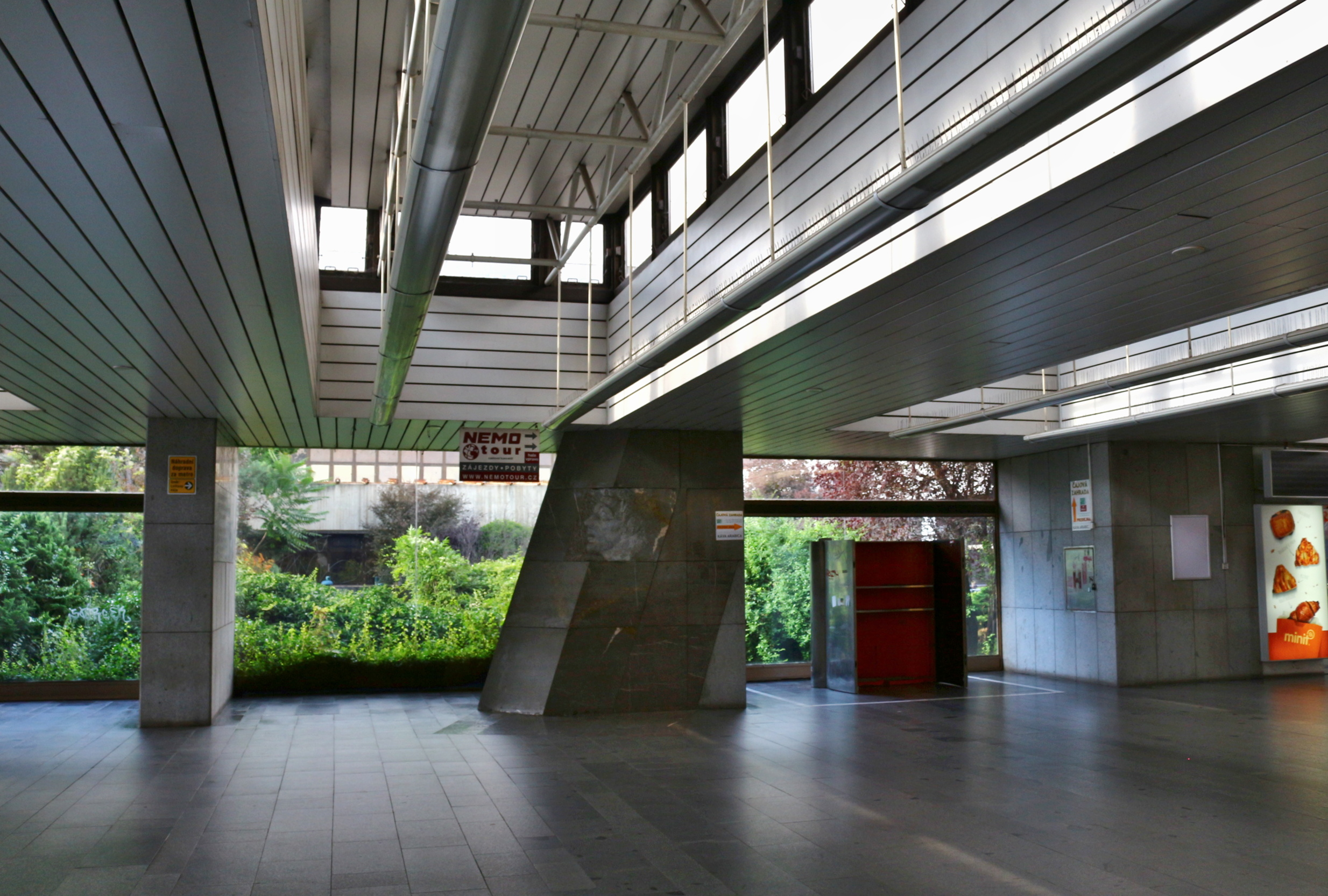 Nádraží Praha-Holešovice